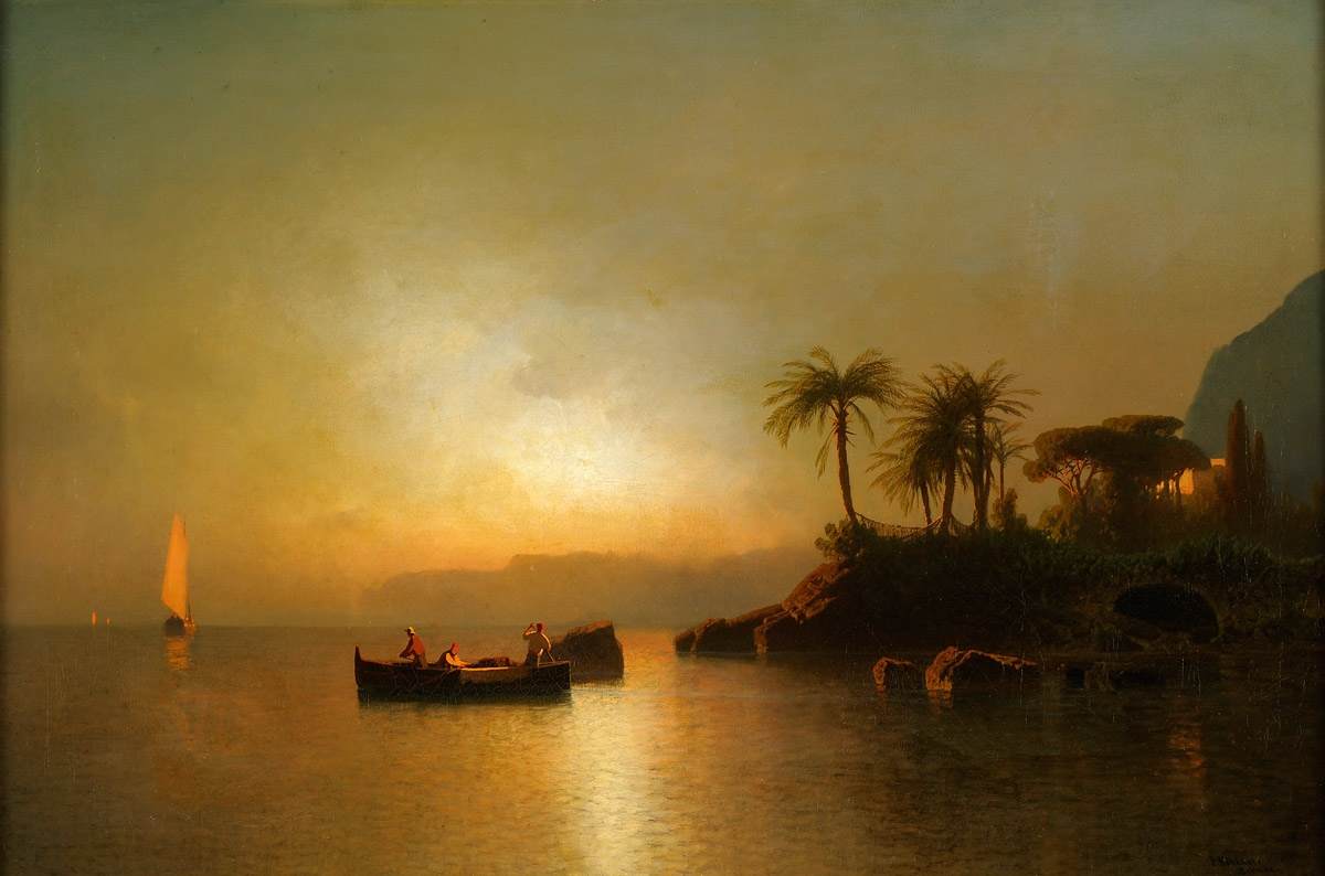 Fischer an der Amalfiküste. Signiert. Öl/Lwd., 66 x 98 cm